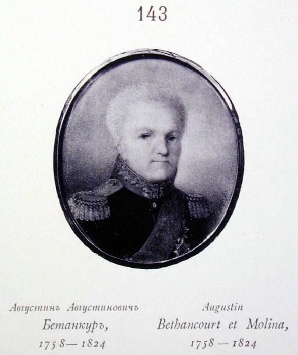 Avgustin Avgustinovich Betankur, 1758-1824